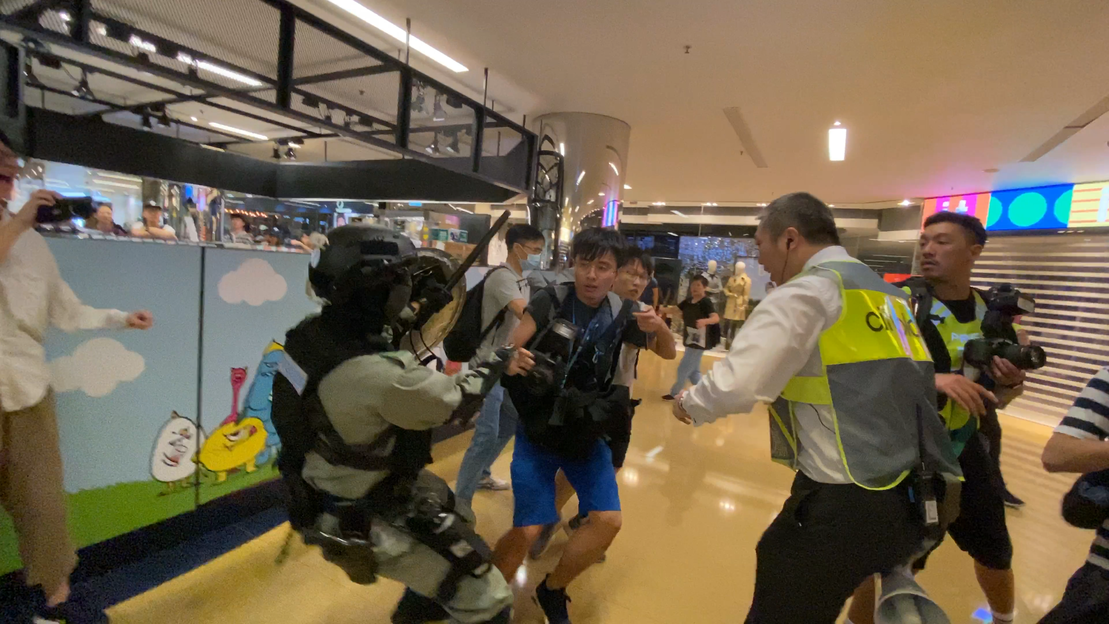 IMG_3984_V2F_2019-11-03_20-51-51_327